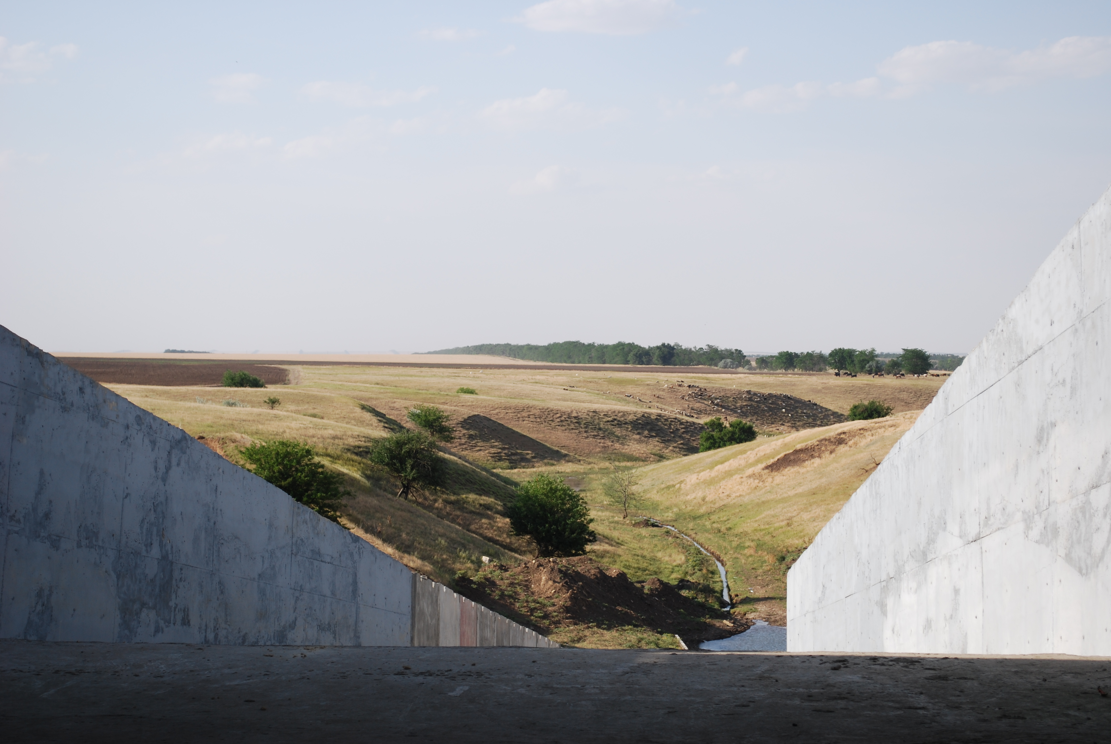 Фотография сброса БСК в поселке Горном